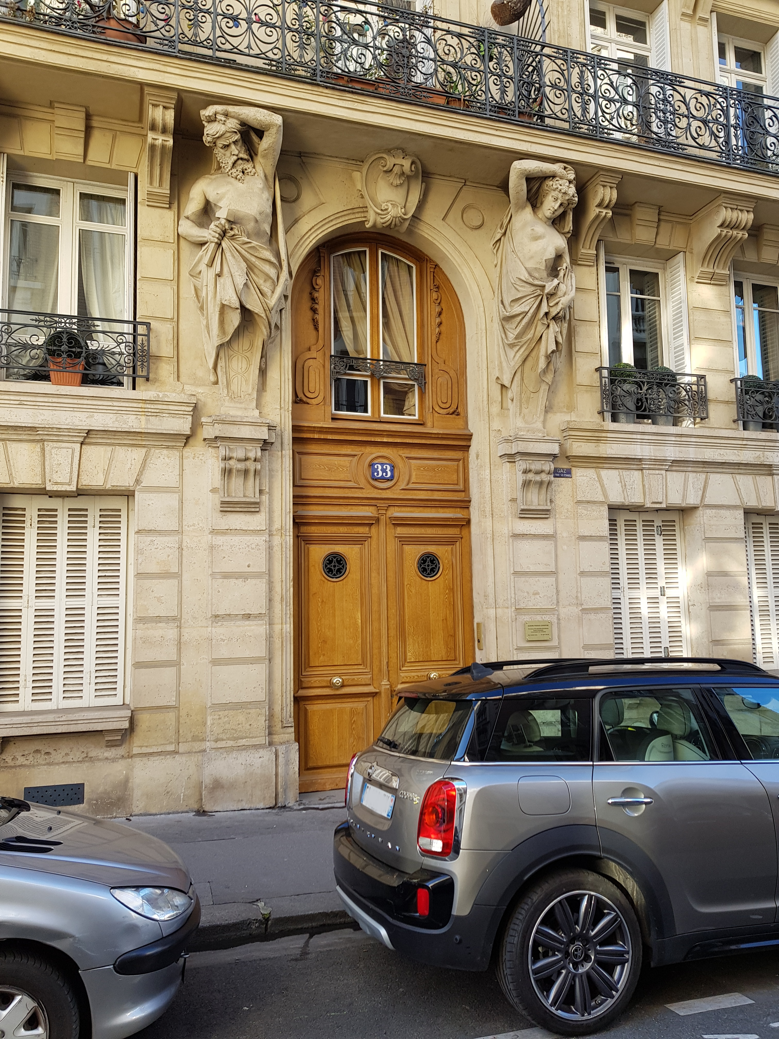 33, rue Leconte-de-Lisle, Paris 16e.